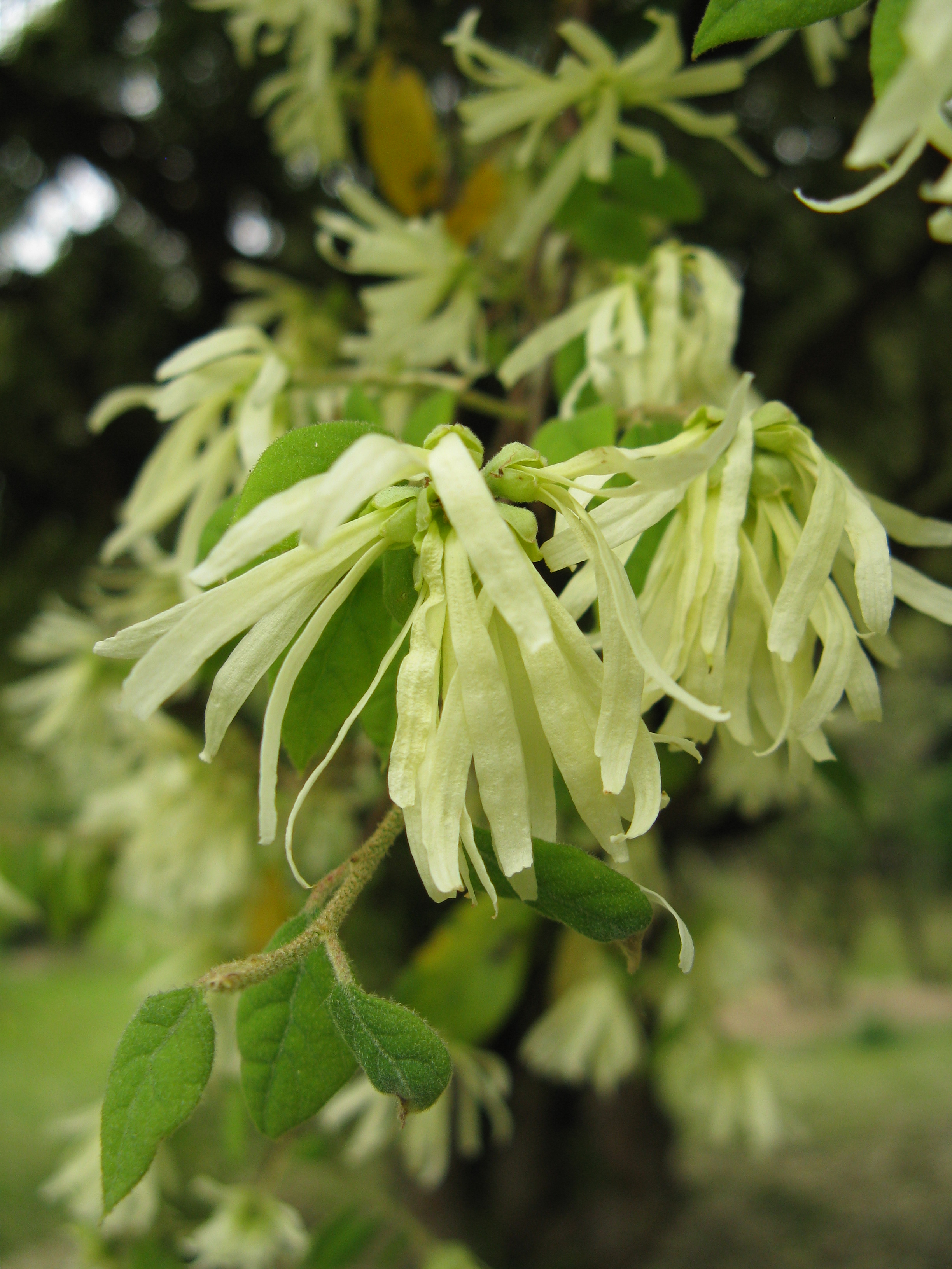 Loropetalum chinense